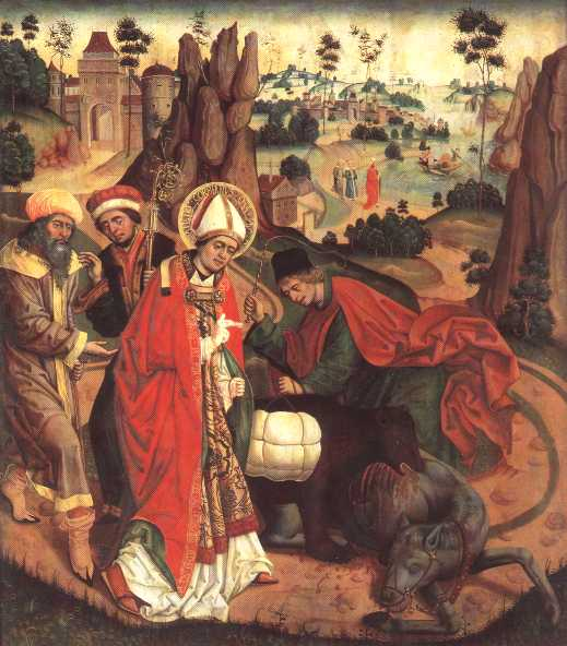 Painting of Saint Corbinian (Korbinian) — Der Heilige Korbinian von Freising als Bischof bei seiner Überquerung der Alpen auf dem Weg nach Rom im Jahre 710 (seiner zweiten Romreise)